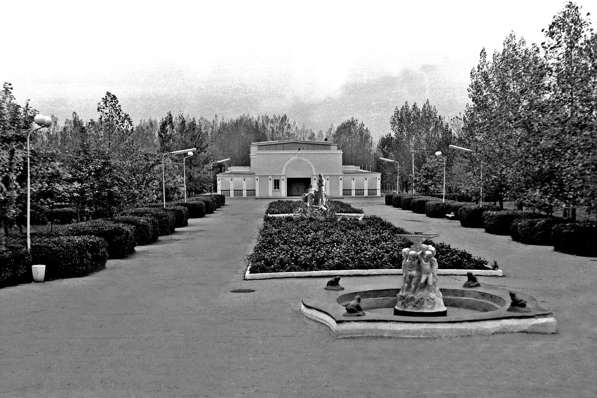 Парк Горького поселка Черноморского